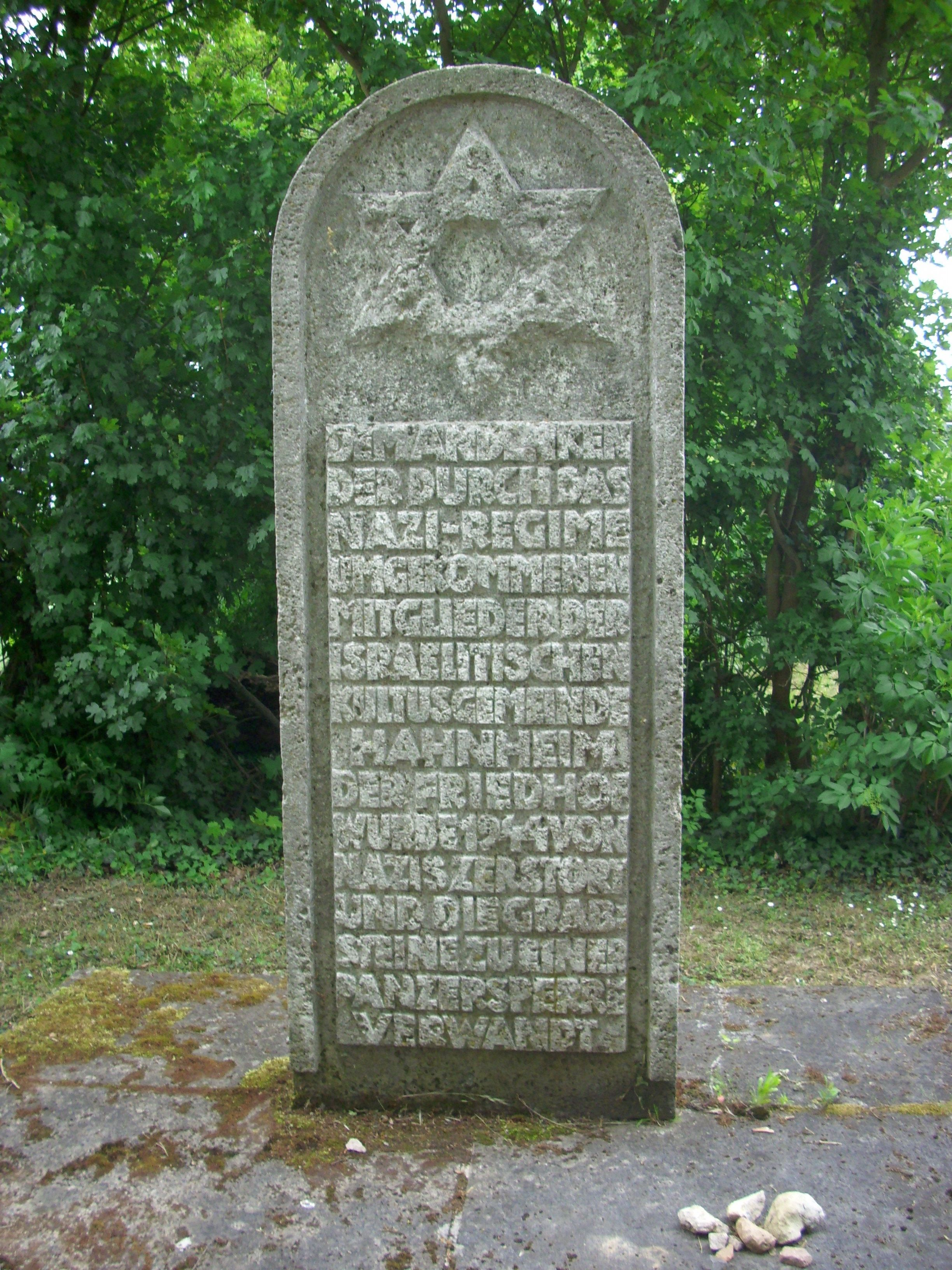 Um 1884 angelegtes, bis 1938 belegtes langgezogenes Areal; 16 Grabmäler bzw. -fragmente von 1870 bis 1922; Holocaust-Gedenkstein, 1948